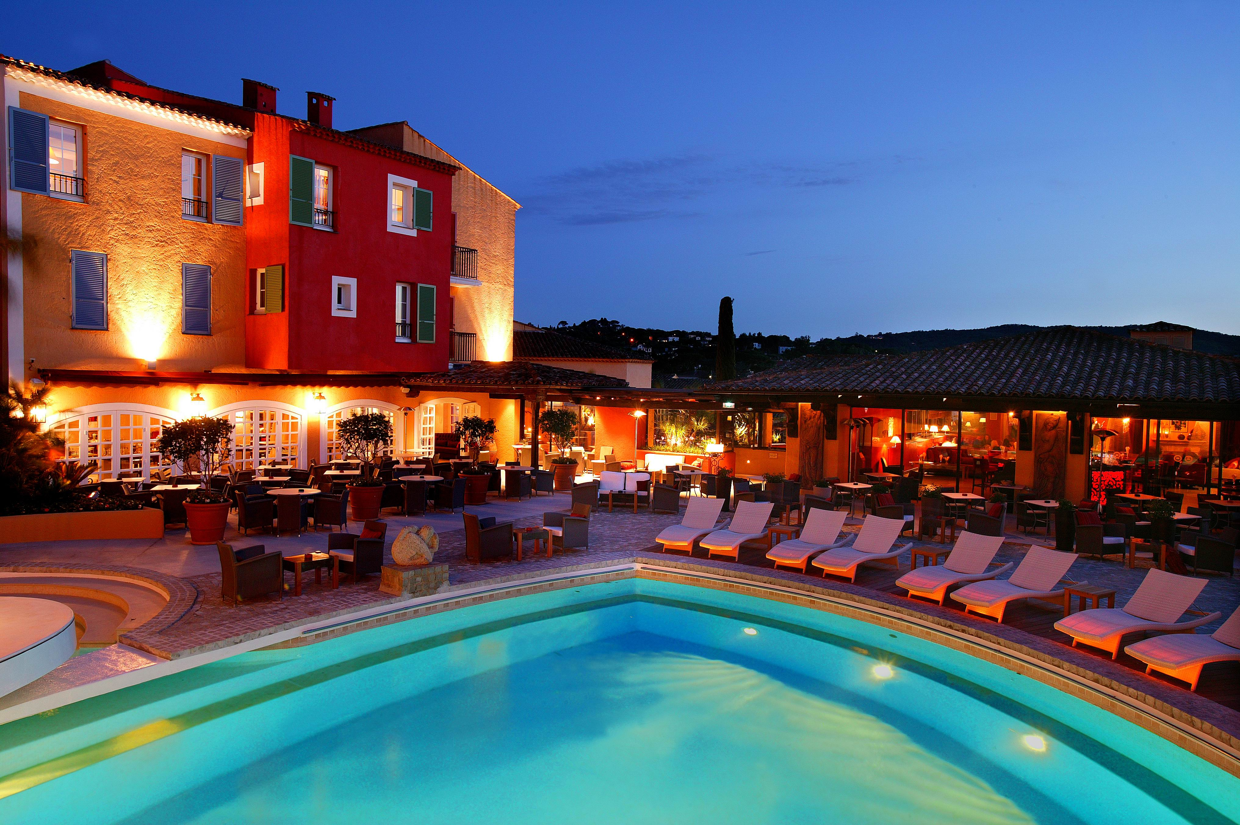 En Bordure de piscine, pour un apéro ou pour découvrir au diner, le concept "Byni'z"...